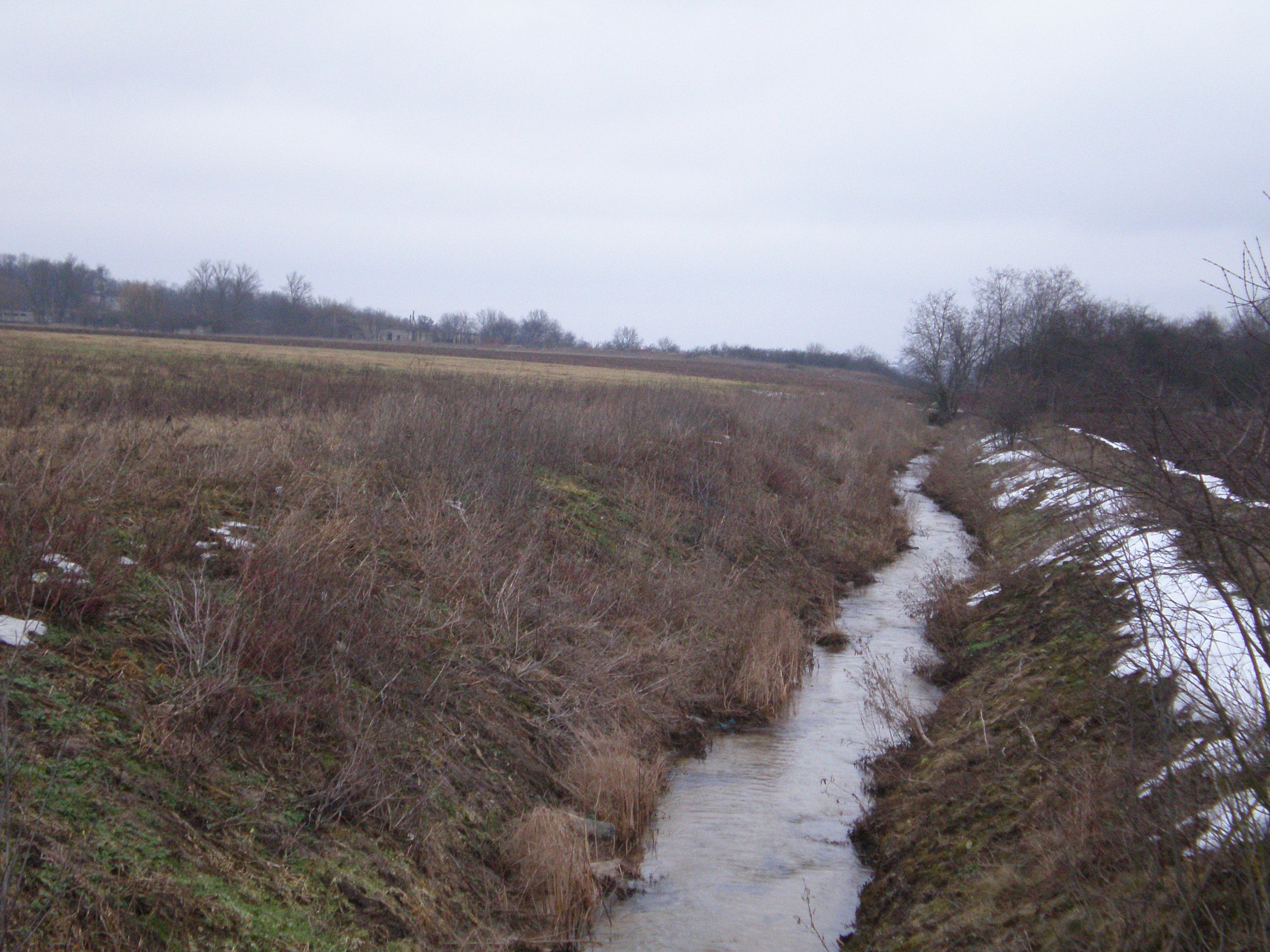 Melioracijos griovys Kėdainių raj. 2007.03.05 Foto: Hugo.arg